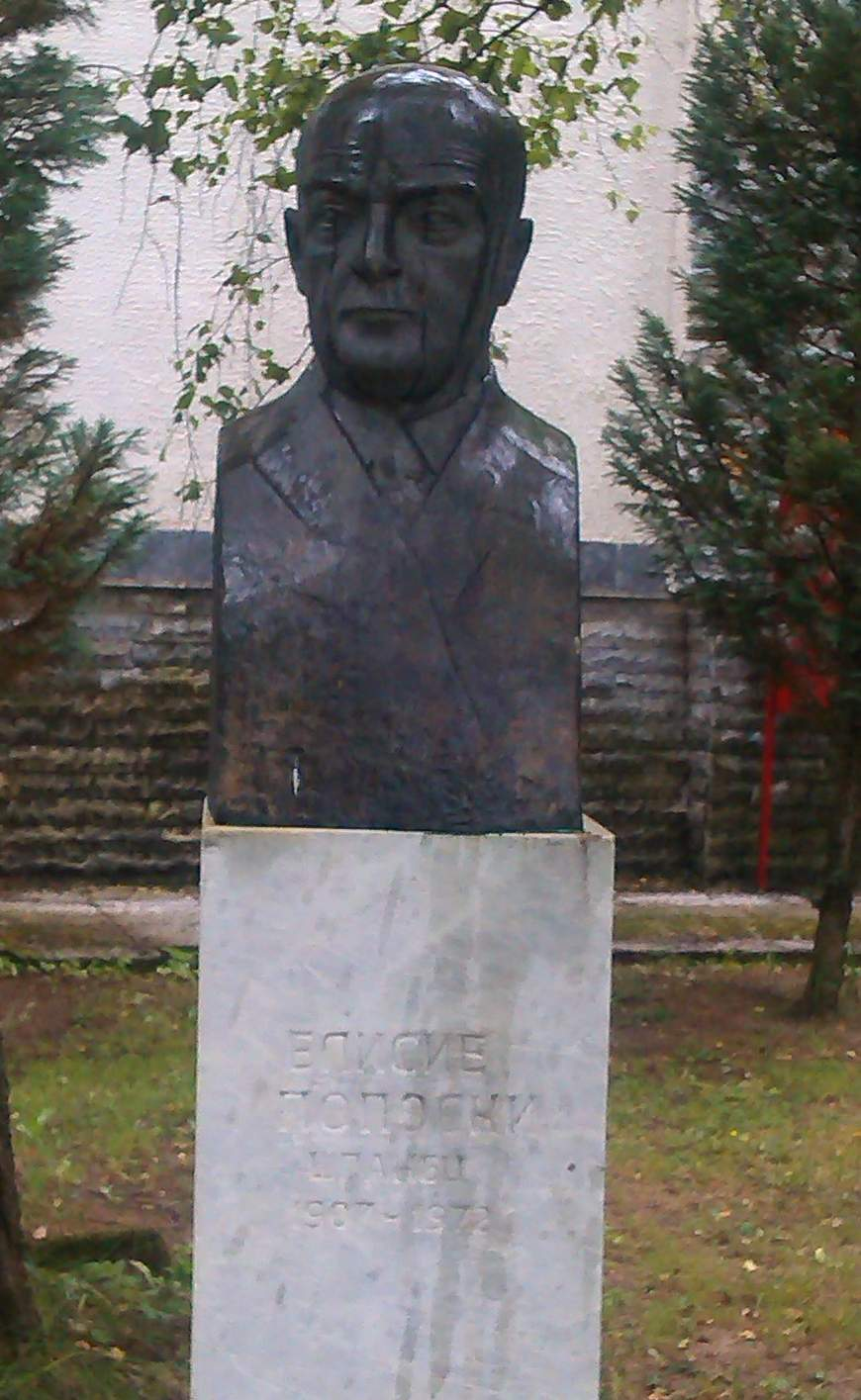 Биста на Елисие Поповски во Маврово